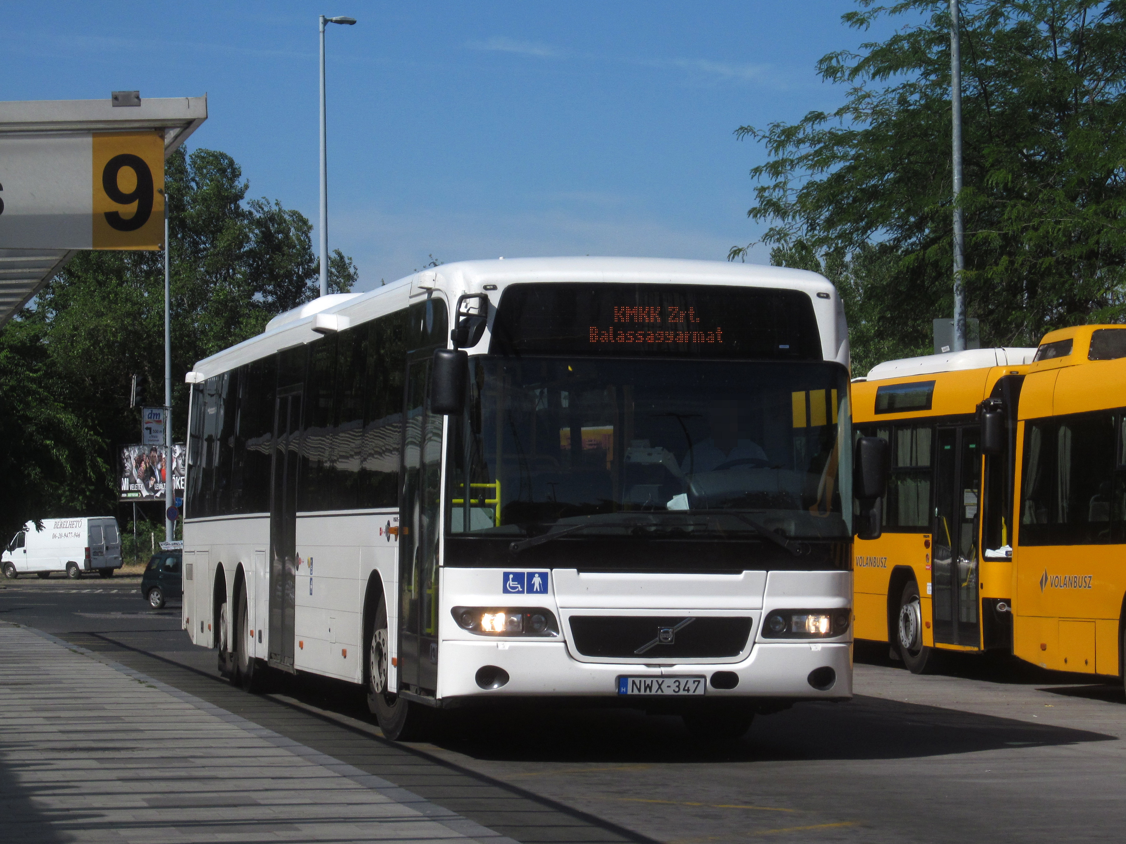 NWX-347 Säffle 8500LE 6x2